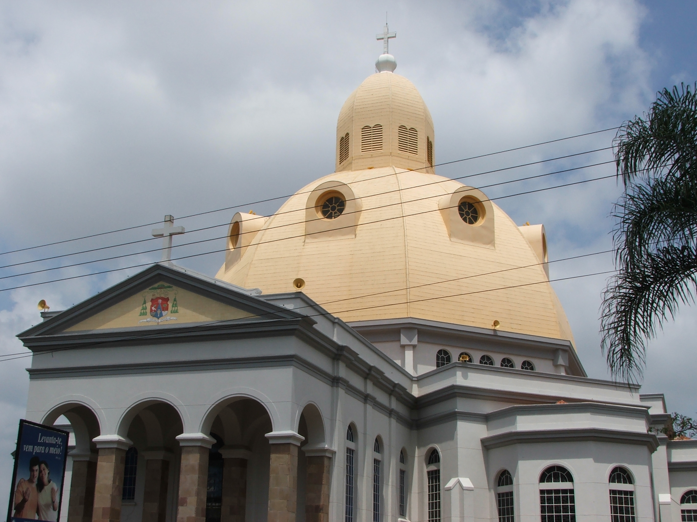 Catedral de São Carlos Borromeu, localizada em São Carlos (São Paulo), Brasil